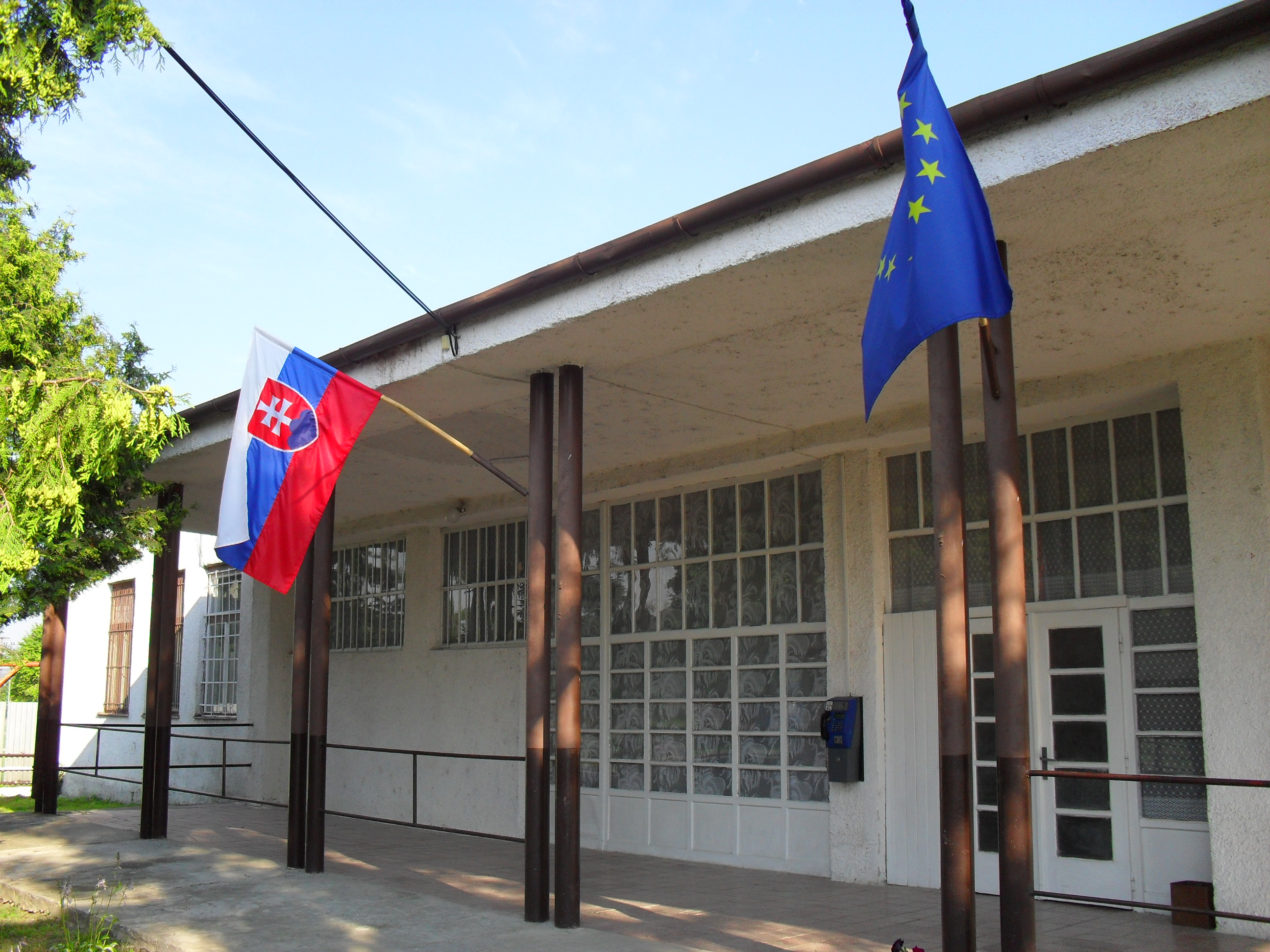 Bodrogszentmária - községi hivatal